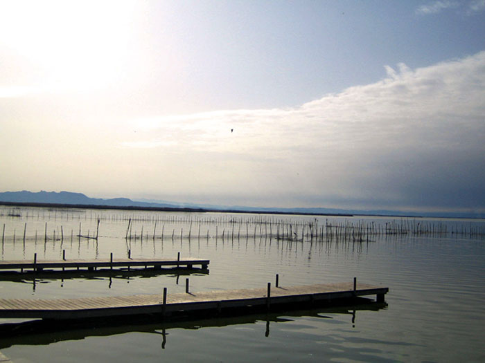 l'Albufera de València des de l'embarcador del pujol.